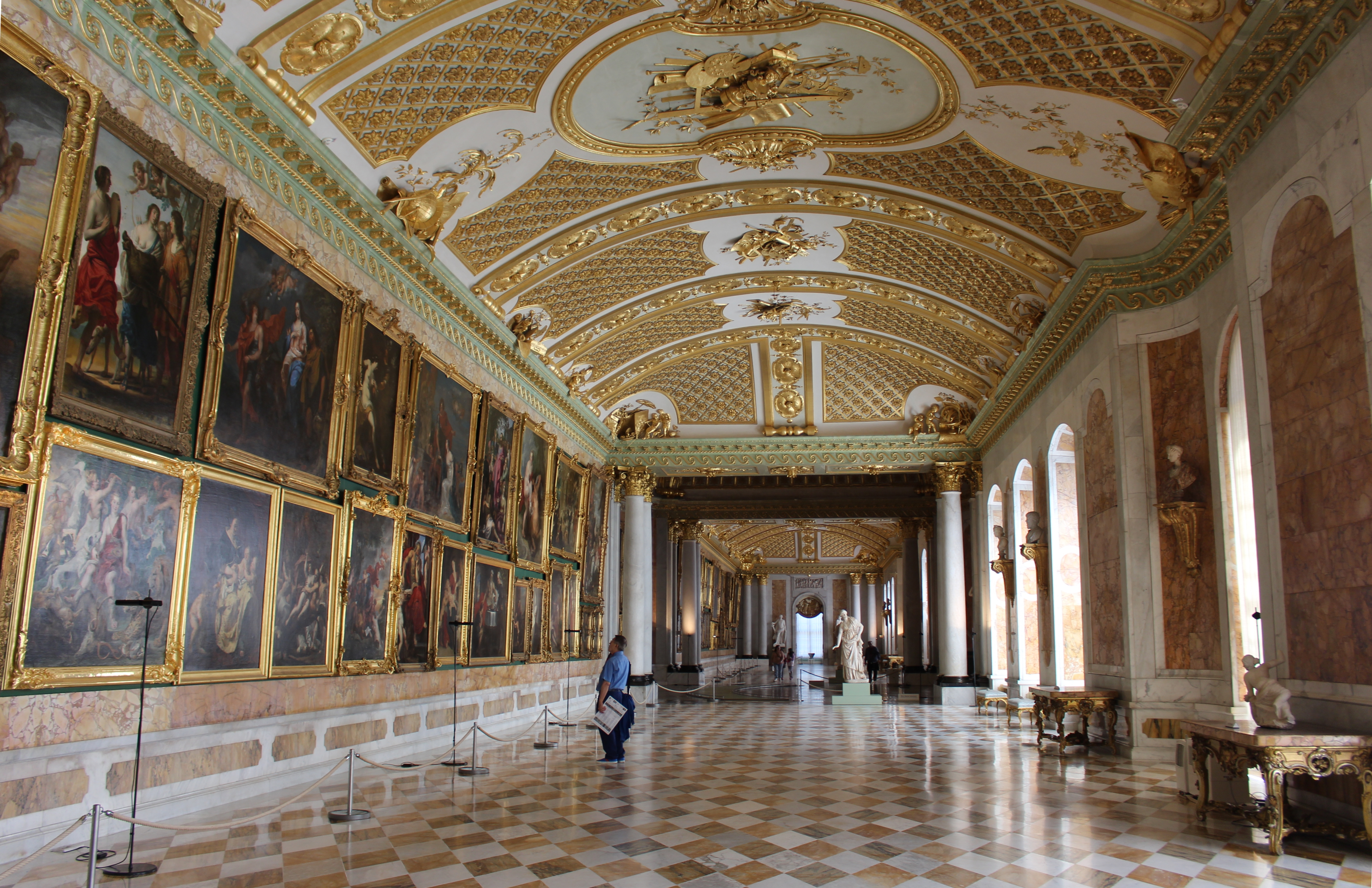 Sanssouci Picture Gallery